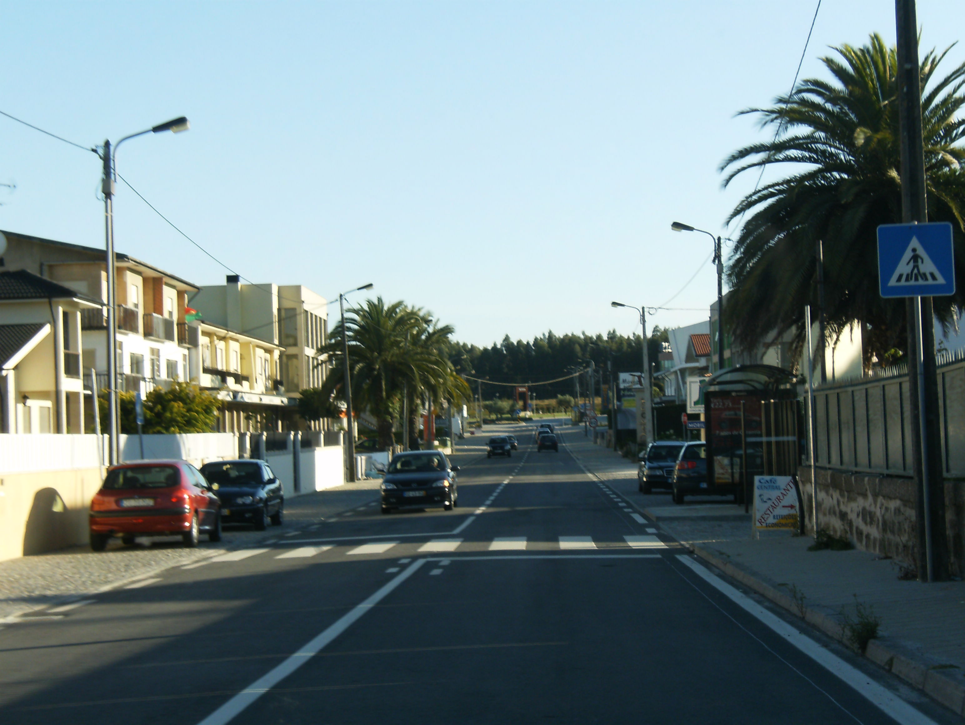 Avenida Central de Seroa, EN 207, Seroa-Paços de Ferreira